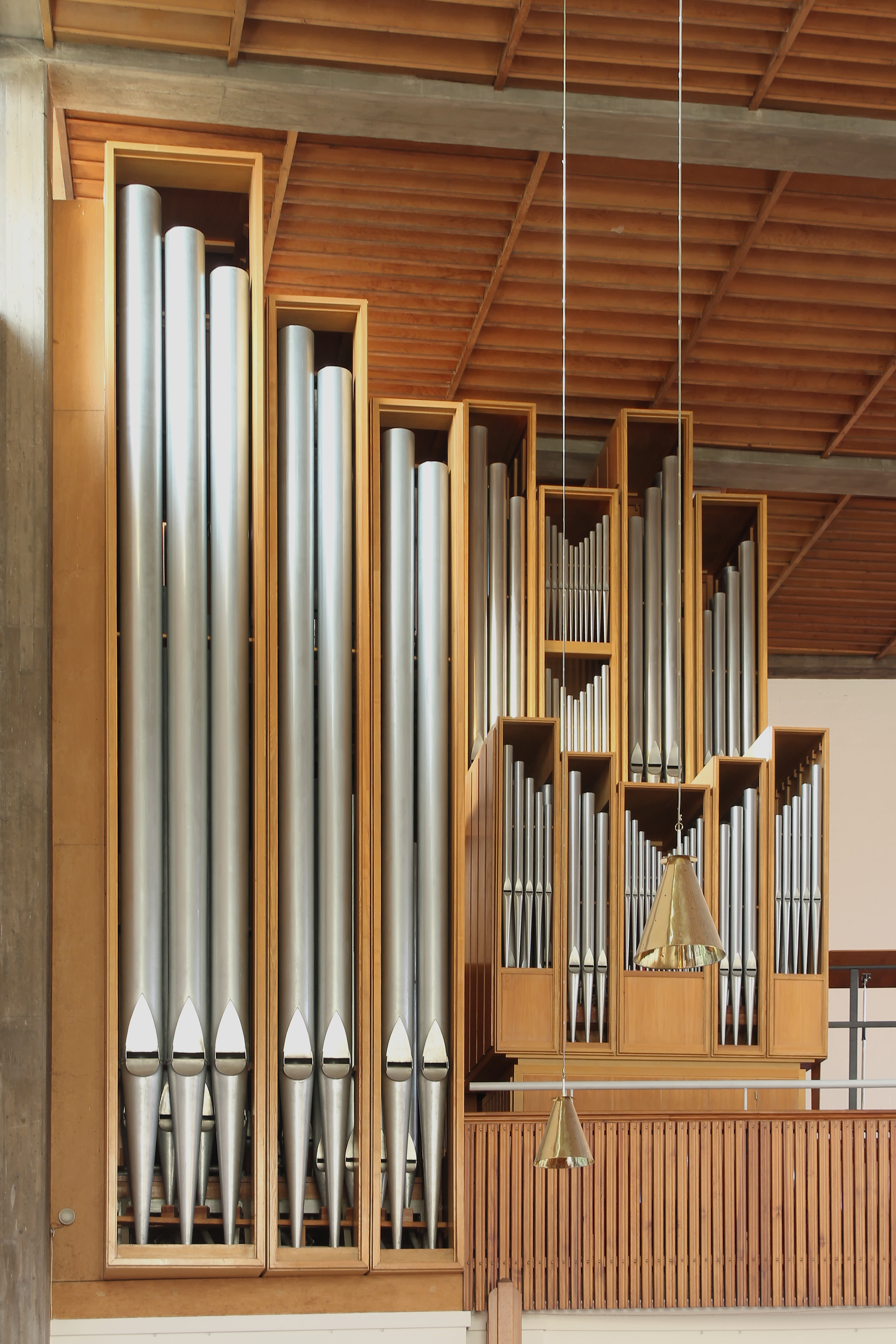 Hamburg-Harburg, St. Johannis Kirche, Orgel This is a photograph of an architectural monument.